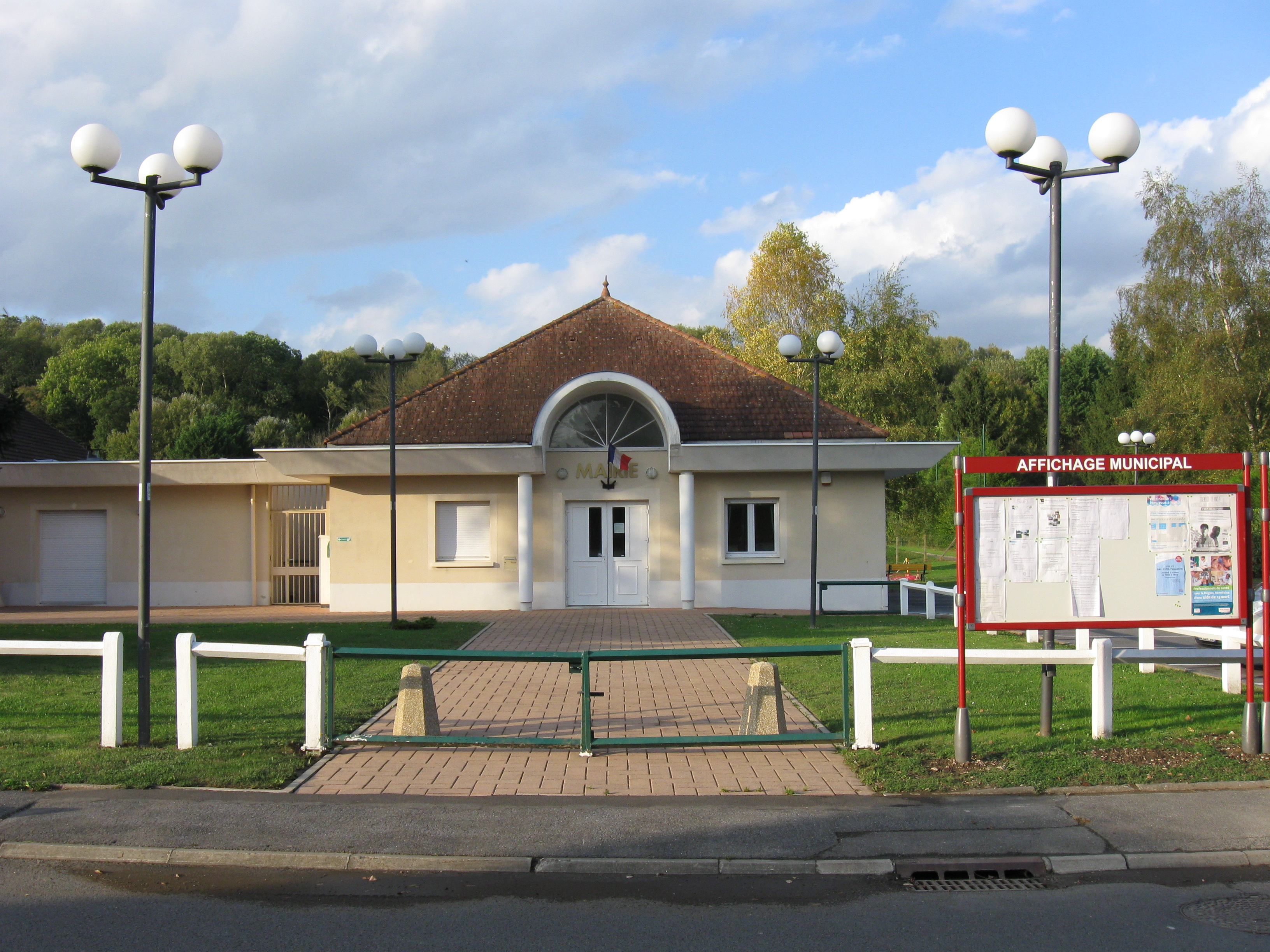 Mairie de Cuisy. (Seine-et-Marne, région Île-de-France).